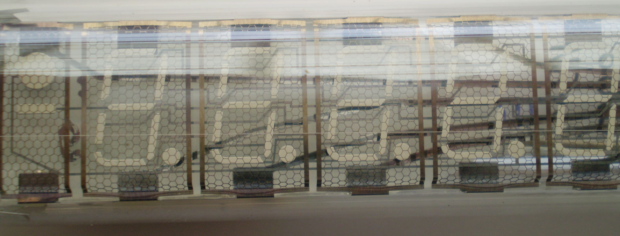 Zdjęcie fragmentu radzieckiego wyświetlacza VFD typu IW-18, widoczne główne elementy konstrukcyjne